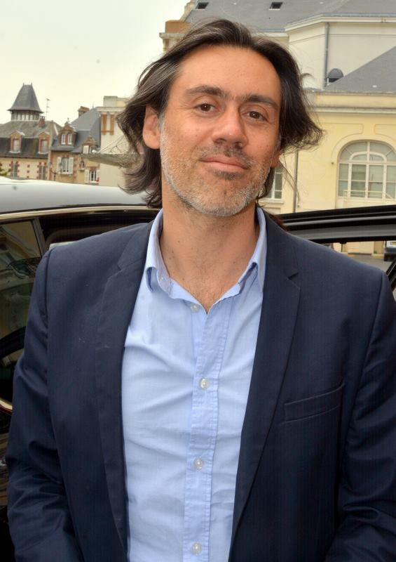 Emmanuel Mouret au festival de Cabourg